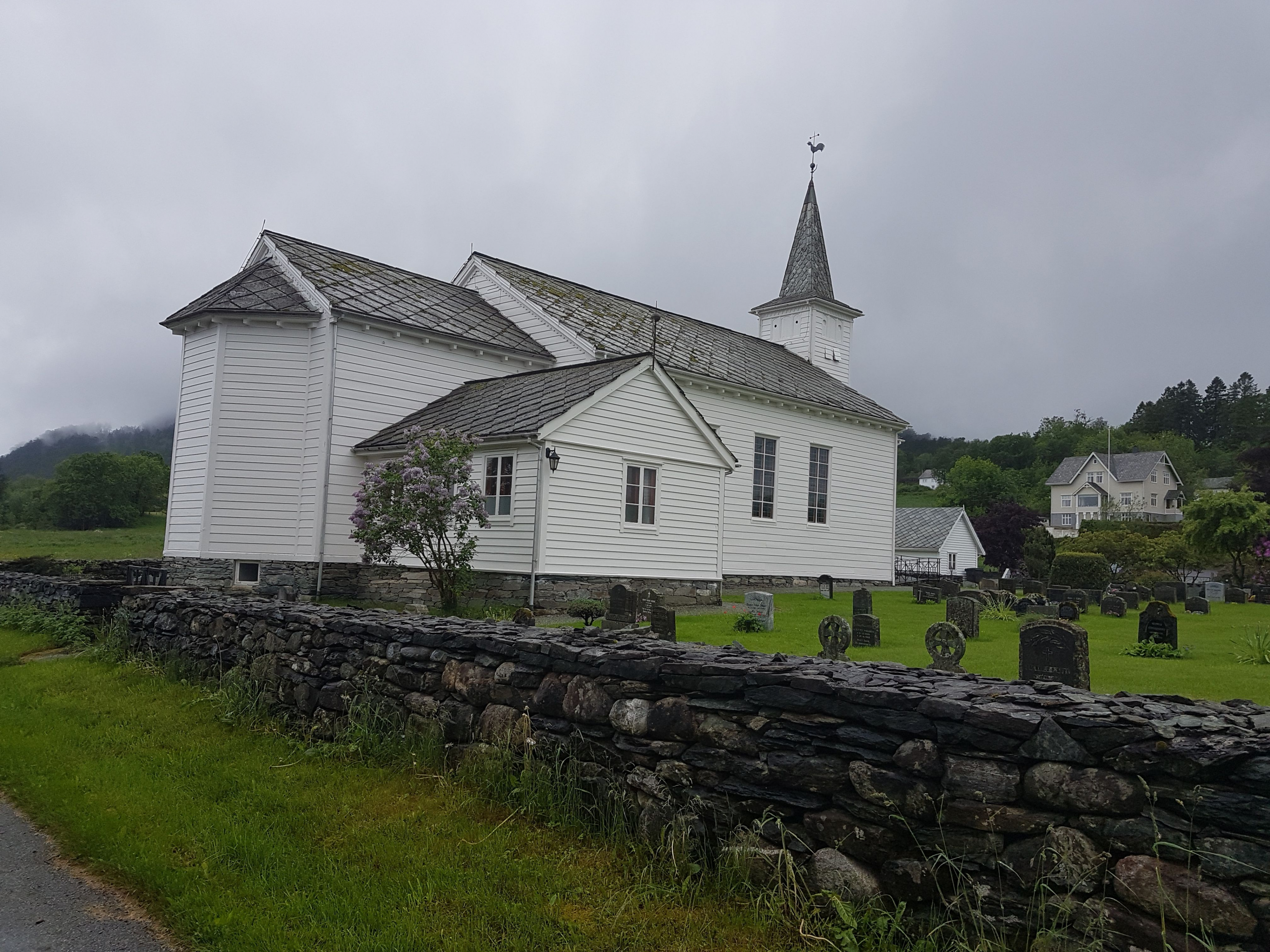 Ølve kirke. Foto: Roger Grimelid. Fra Riksantikvarens Kulturminnesøk.